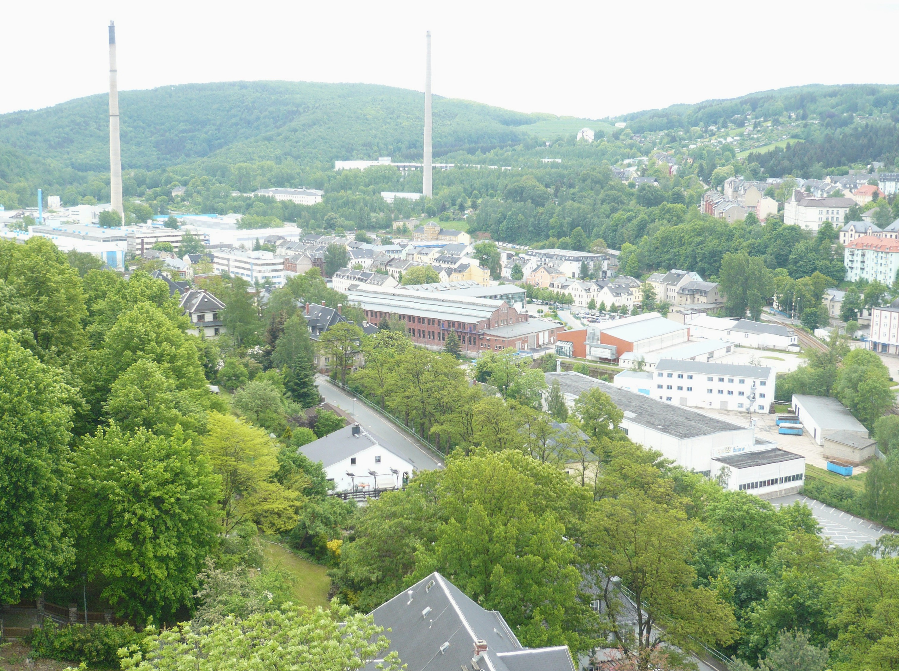 Stadt Aue, Blick auf das Firmengelände der Nickelhütte Aue